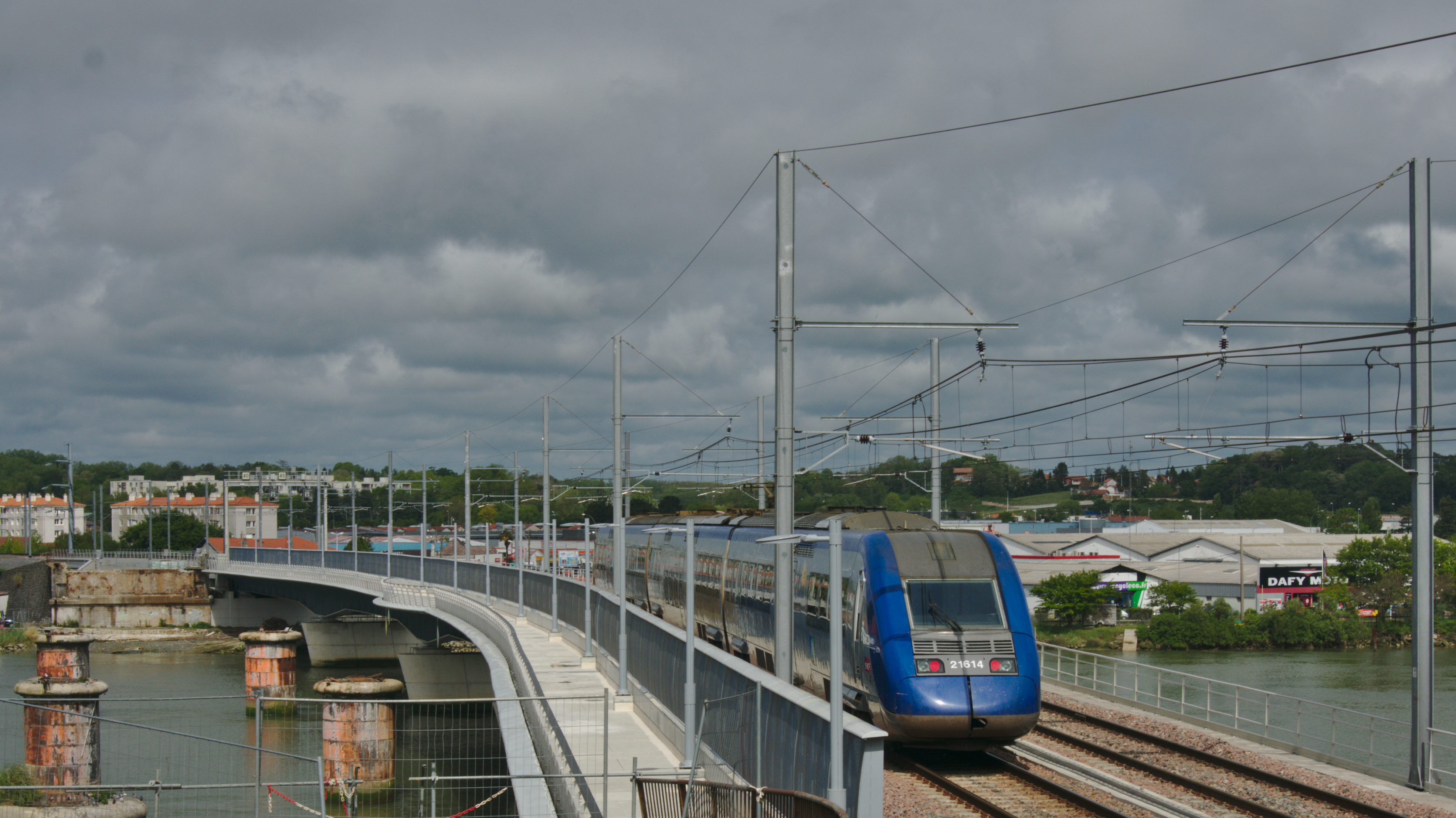 Le Ter Bayonne - Hendaye assuré par l'automotrice Z 21614 franchit le nouveau pont sur l'Adour.